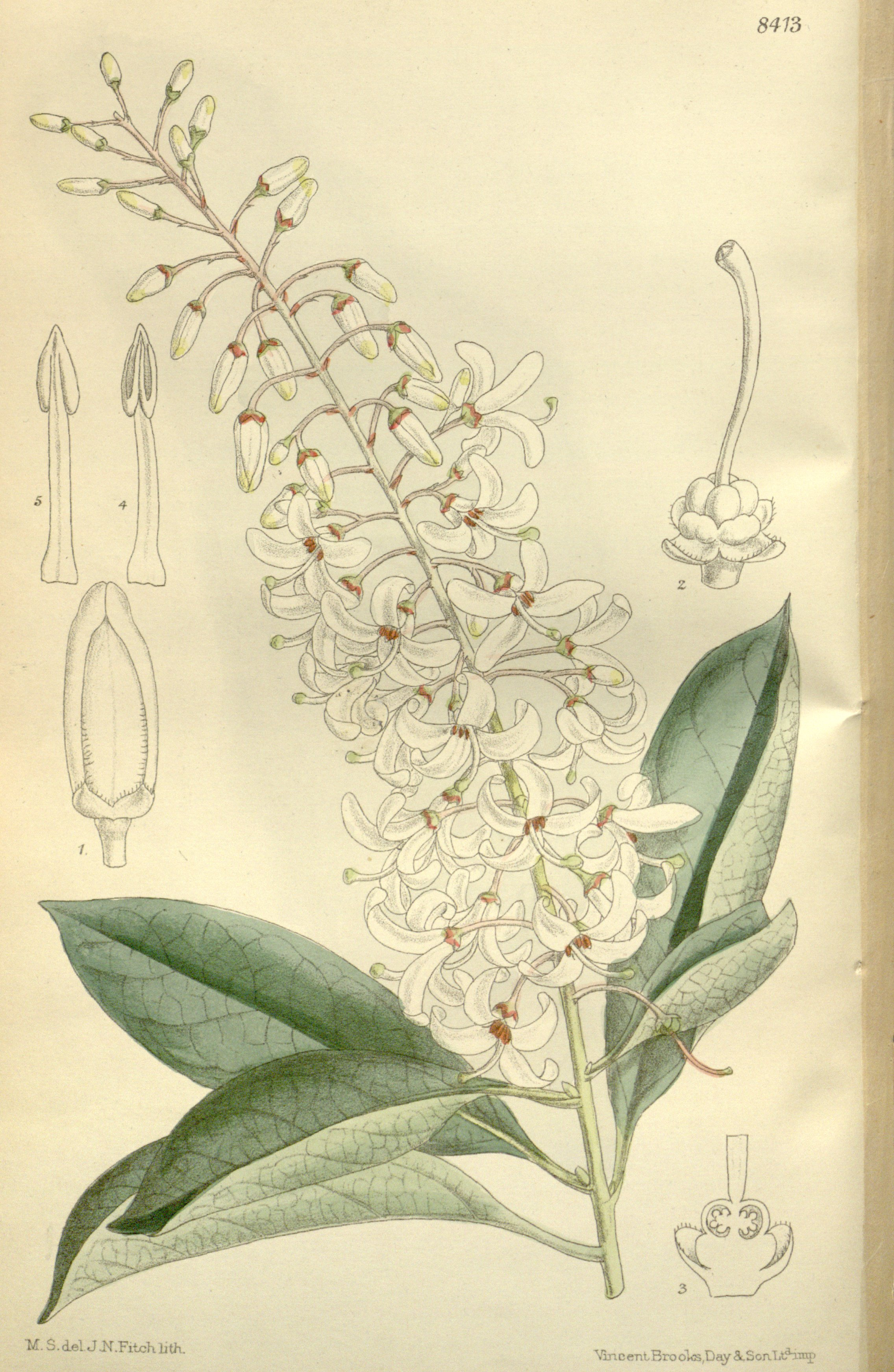 Elliottia_racemosa, Ericaceae